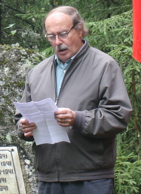 Hannu Harju puhumassa neuvostoliittolaisen Petljakov Pe-8 -pommikoneen lentäjien muistomerkillä Lapinjärvellä.